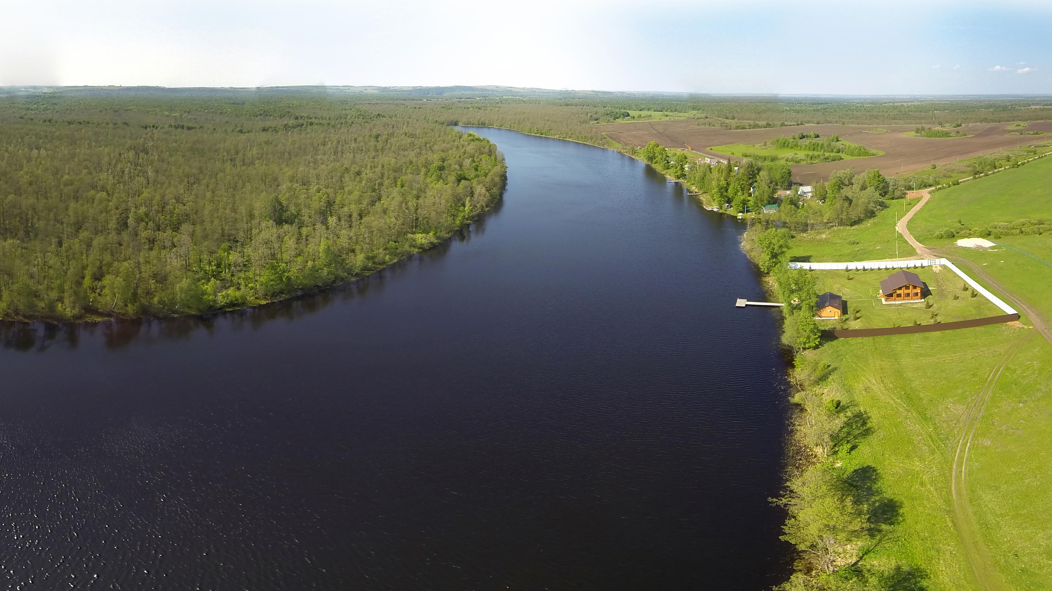 Озеро Упканы-Куль, Нуримановский район This image is related to the protected area of Russia number 0210190